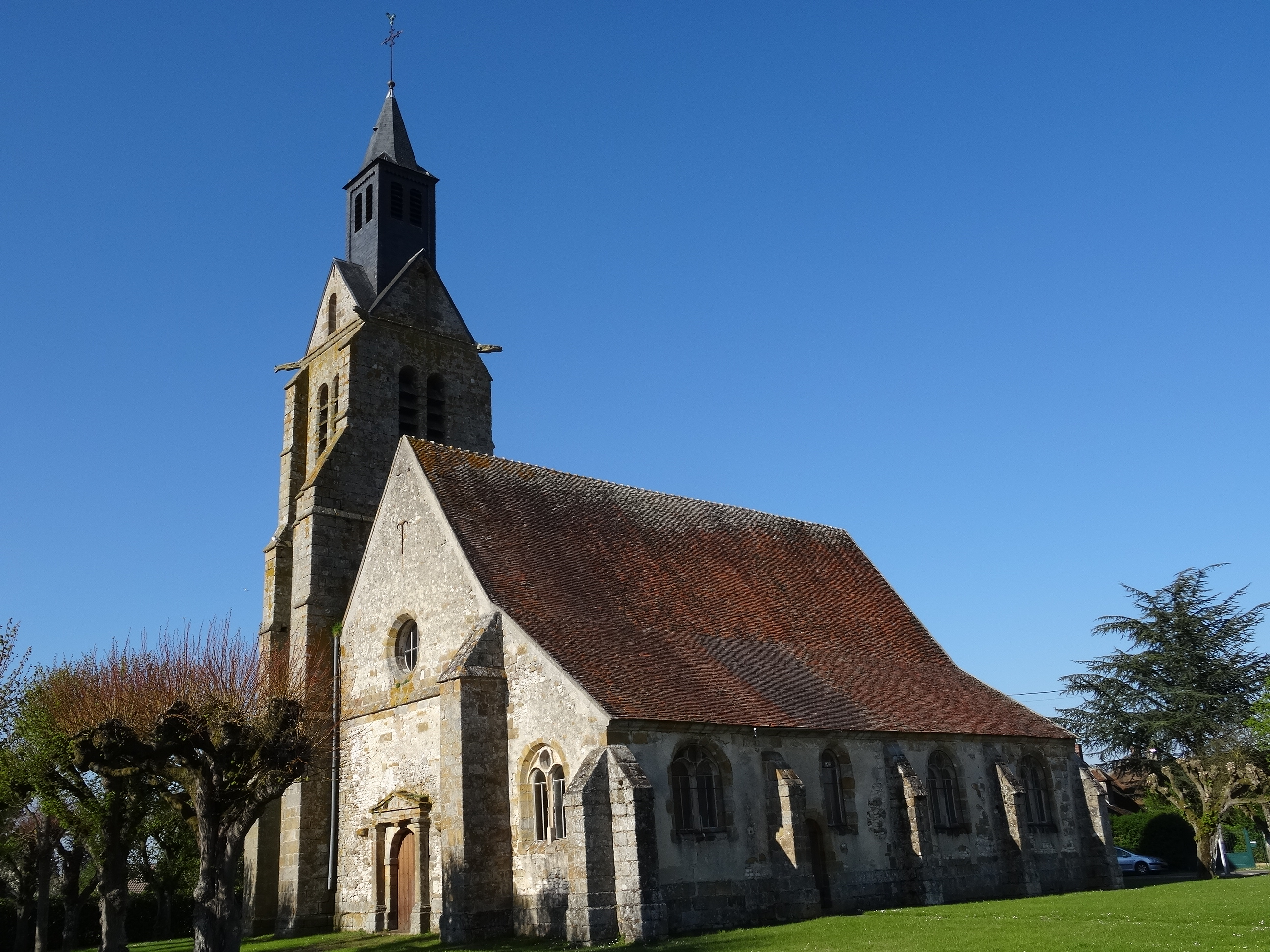 Église Saint-Jacques-le-Majeur de Fontains. (Seine-et-Marne, région Île-de-France).